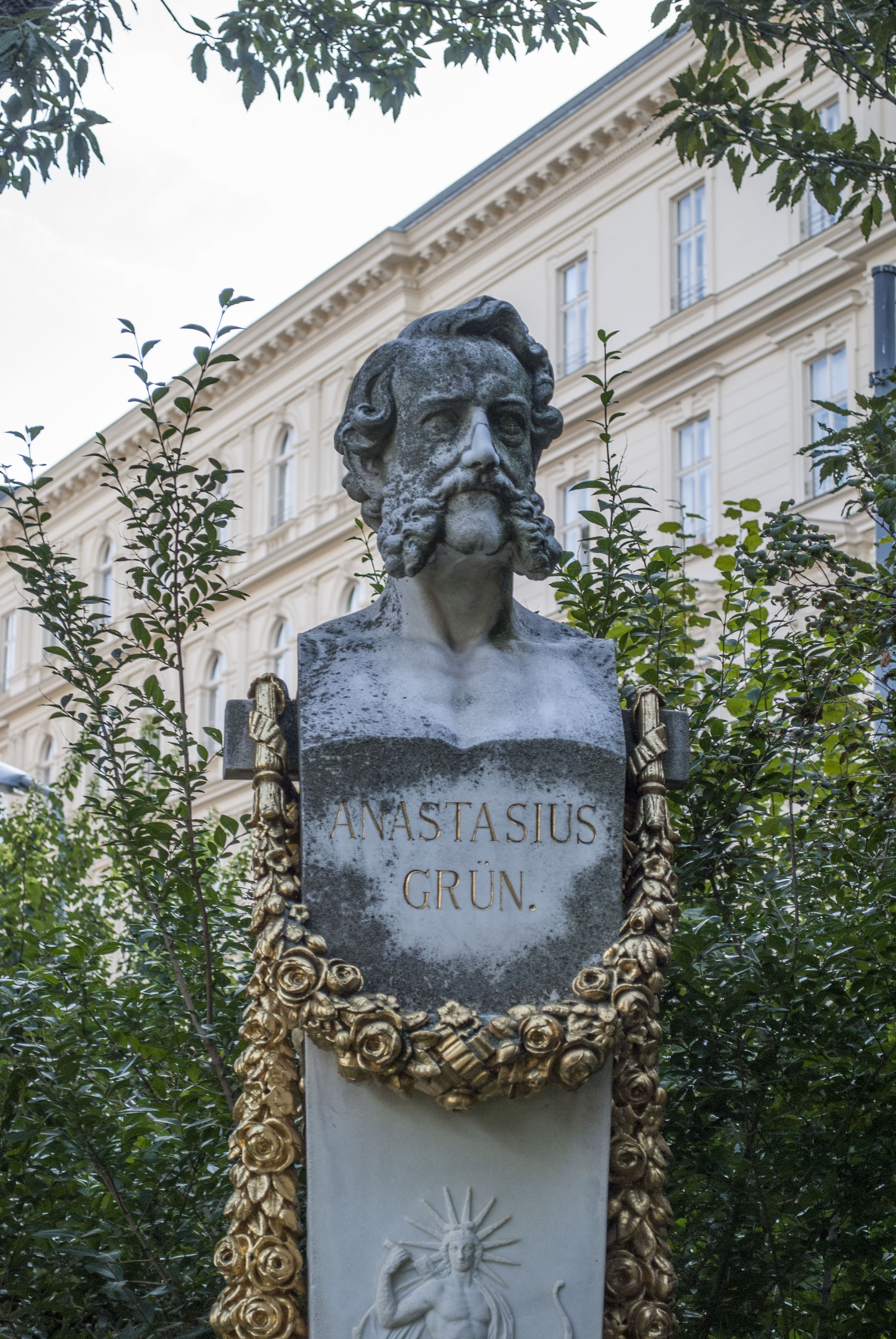 Anastasius Grün monument